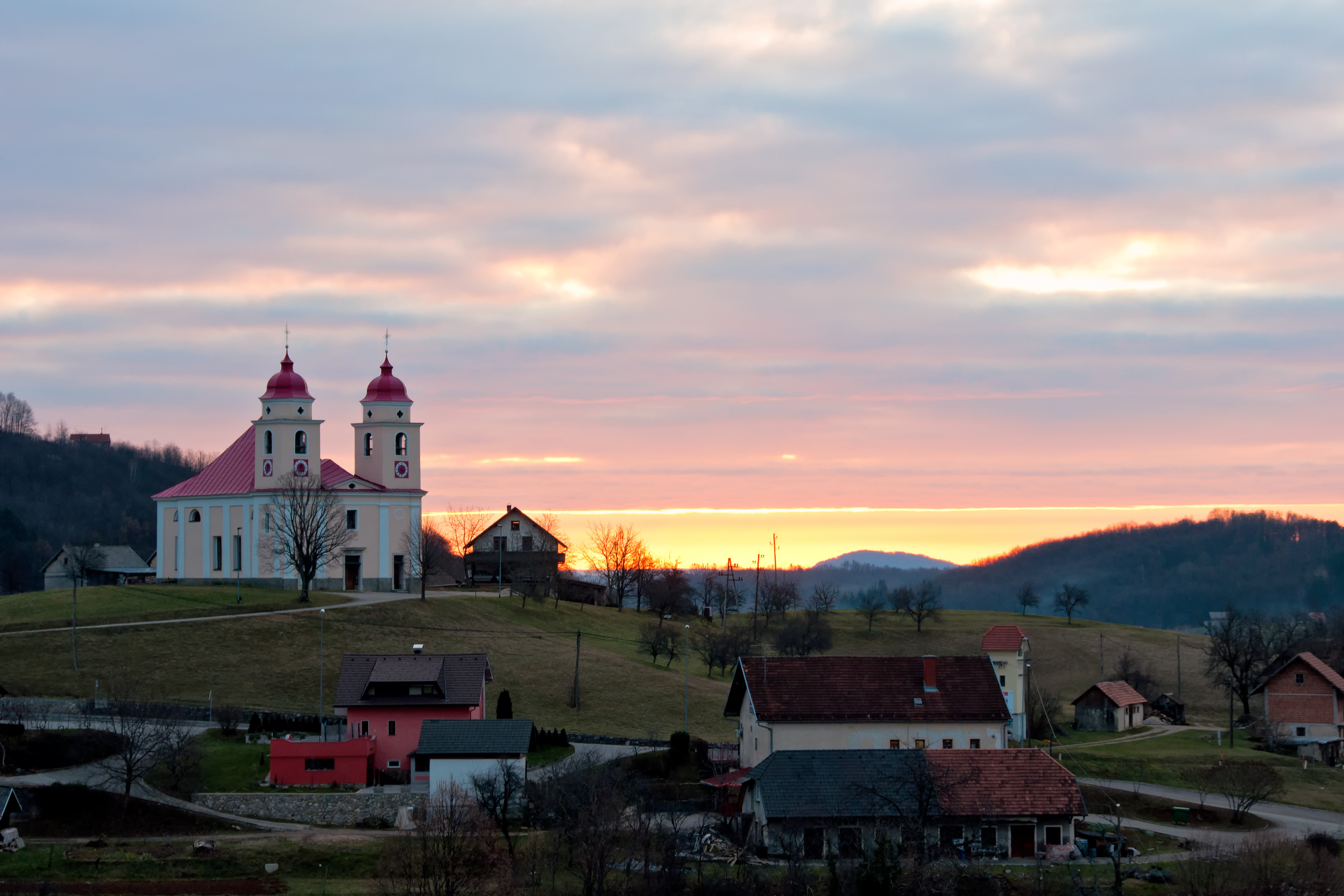 Cerkev v Dolnjem Suhorju in del vasi, posneto s ceste Novo mesto-Metlika